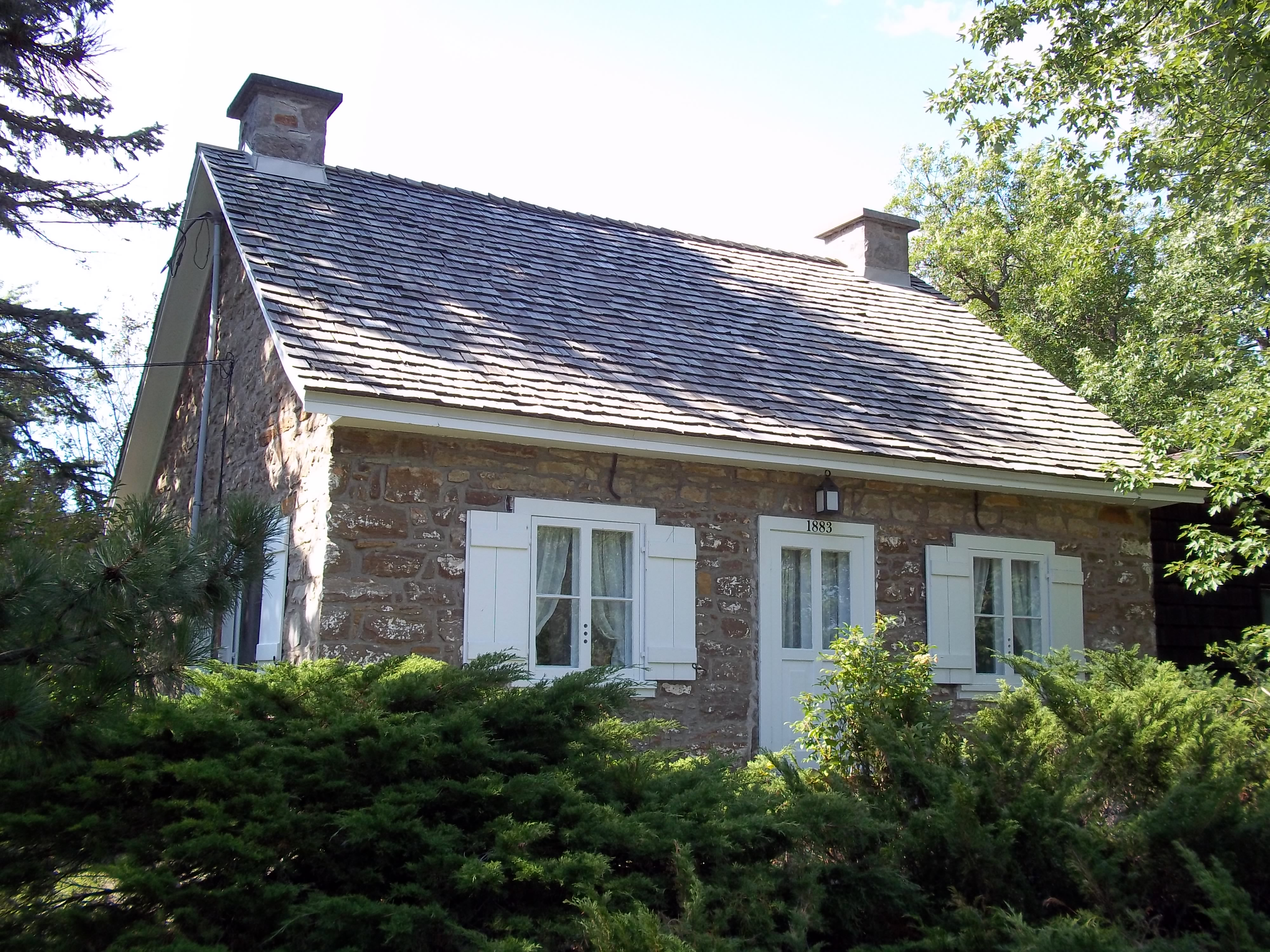 Maison Toussaint-Théorêt, 1883, chemin du Bord-du-Lac, L'Île-Bizard